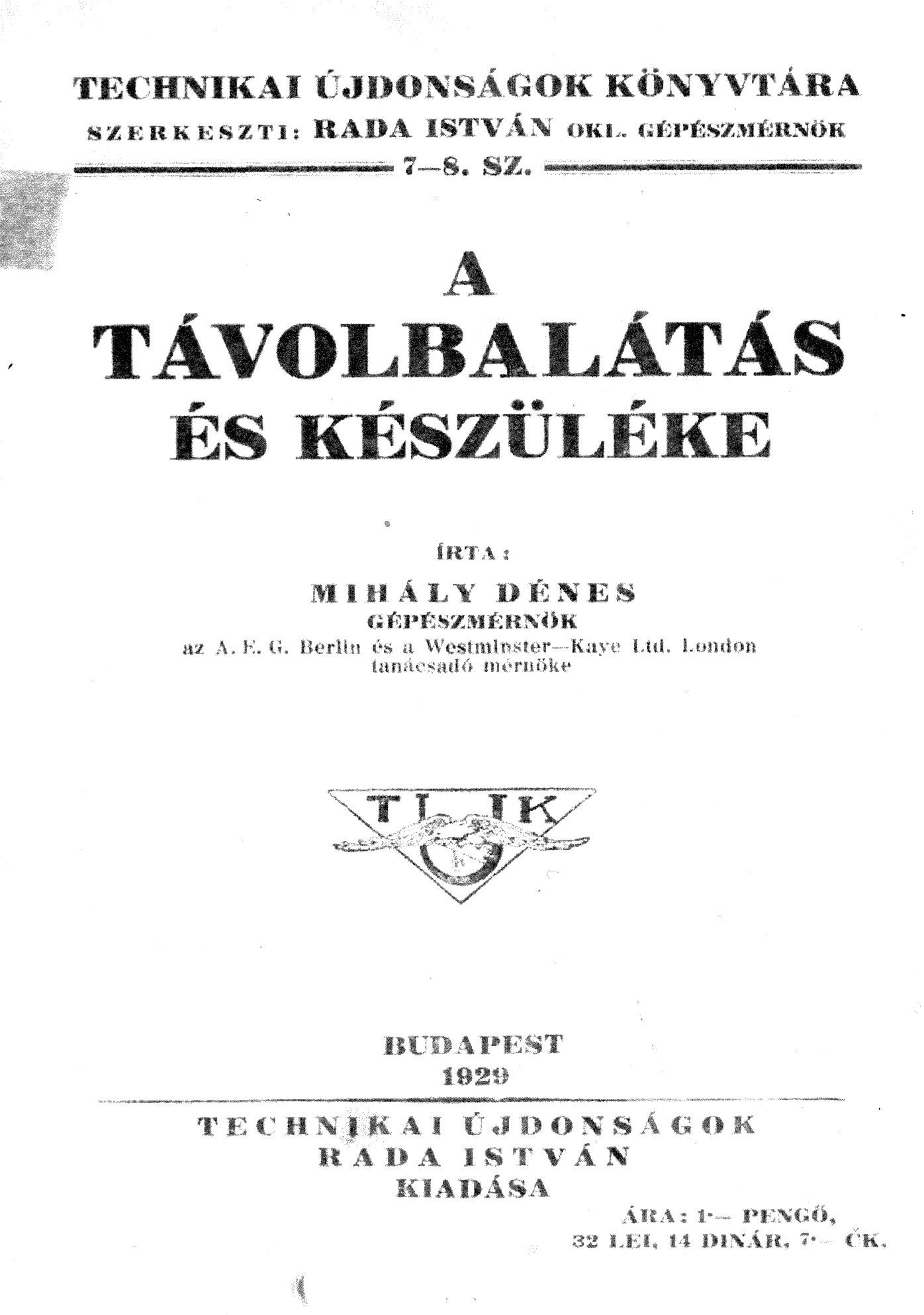 A távolbalátás és készüléke (Telehor)